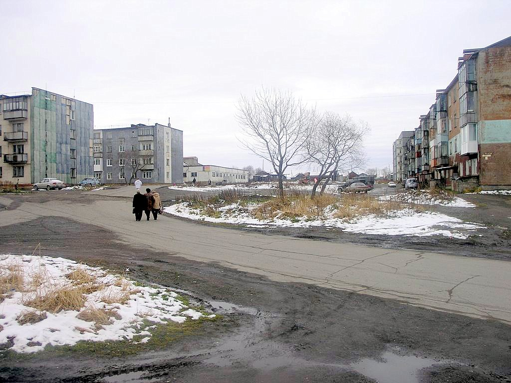 zabudowania wsi Ust´-Bolszerieck